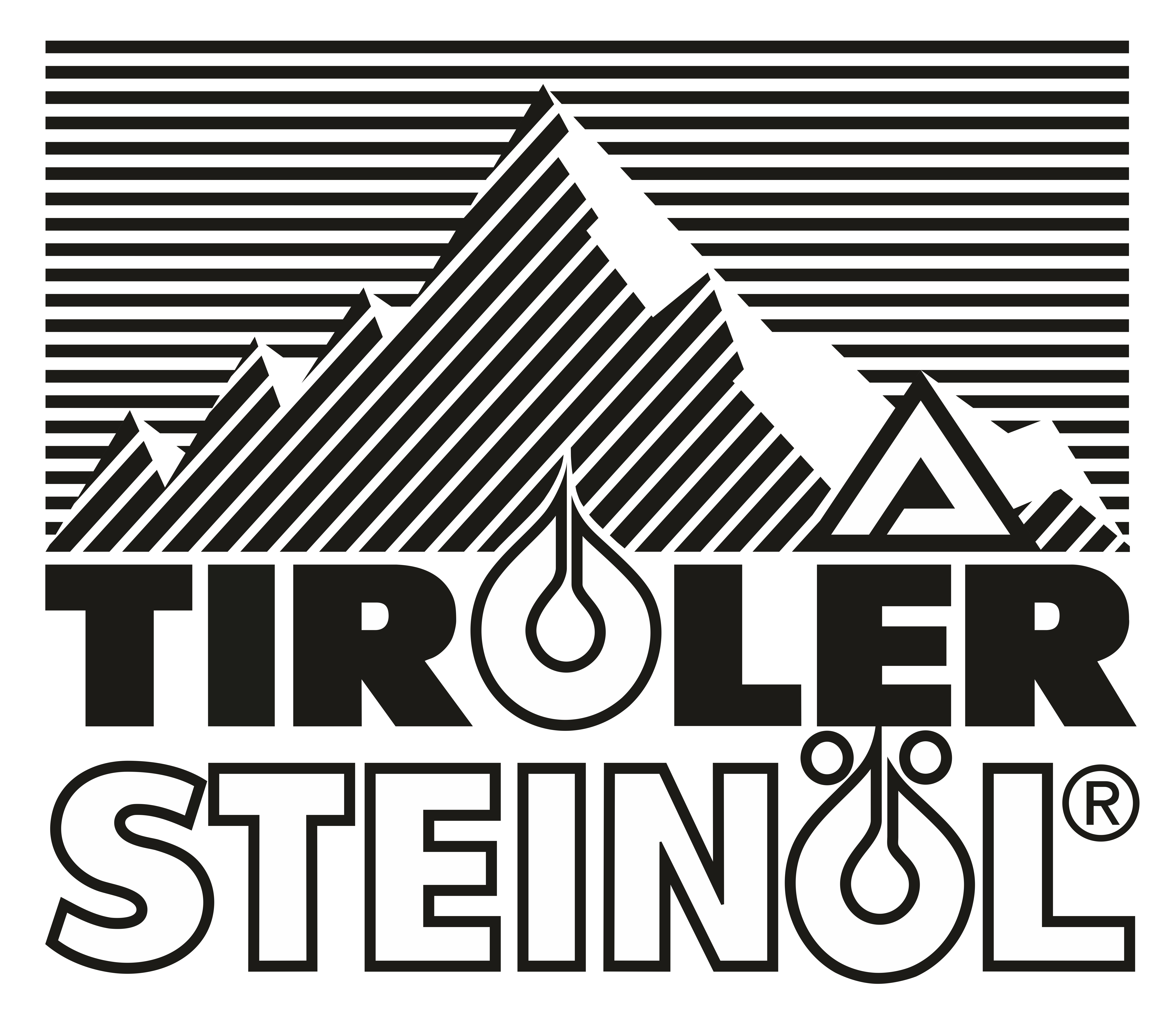 Firmenlogo Tiroler Steinölwerke Albrecht GmbH & Co KG